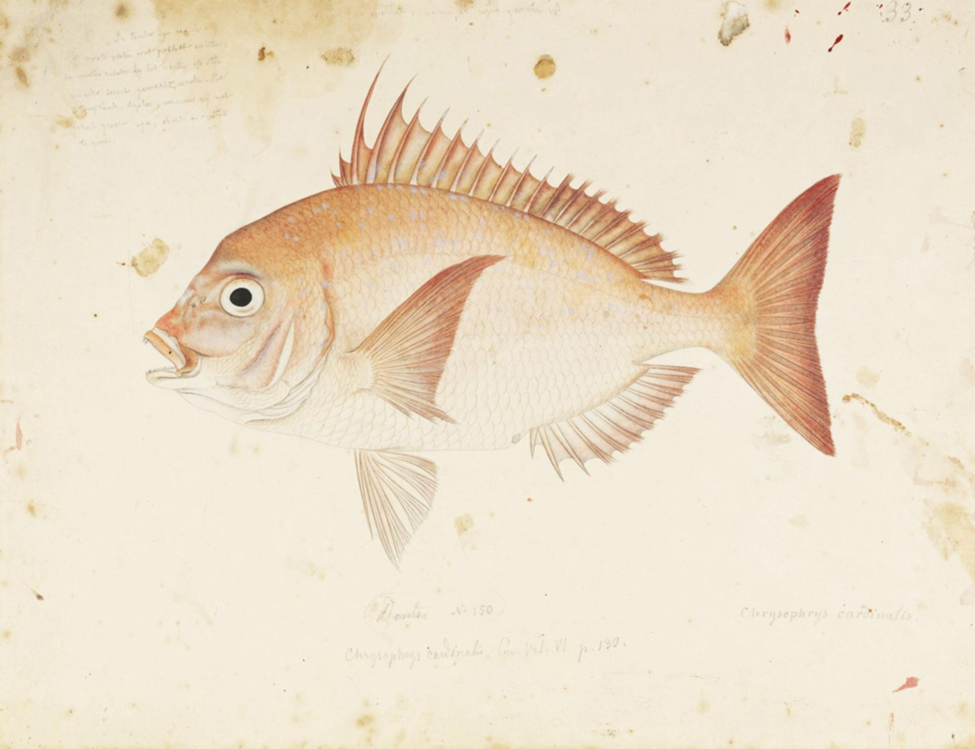 Evynnis japonica Tanaka